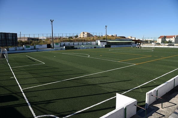 Campo de Jogos da Quinta dos Barros, no Bairro do Grilo (De Dia)